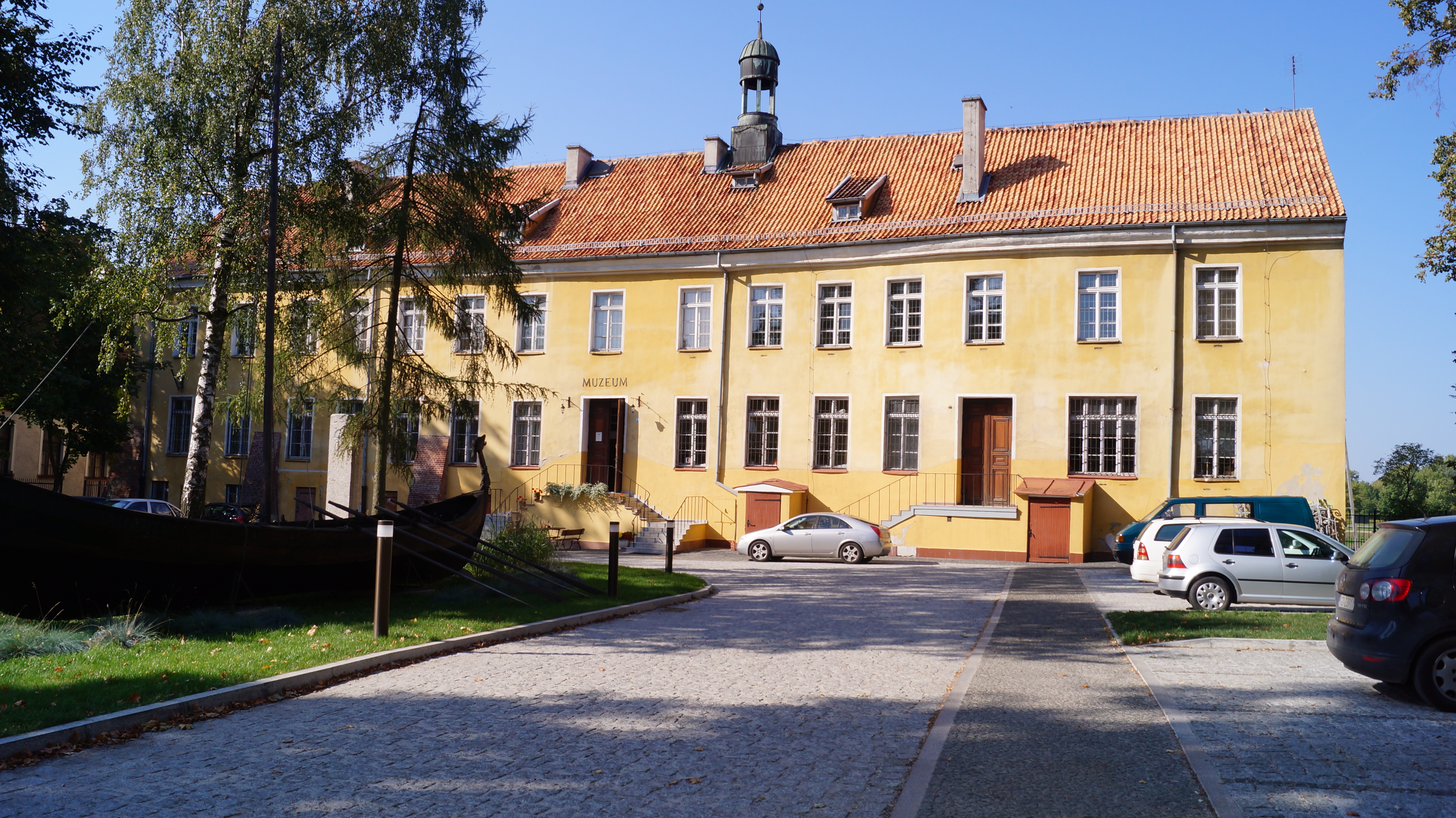 Elbląg, gimnazjum elbląskie (d. spichrz krzyżacki), XIII-XIV, XVI, XIX